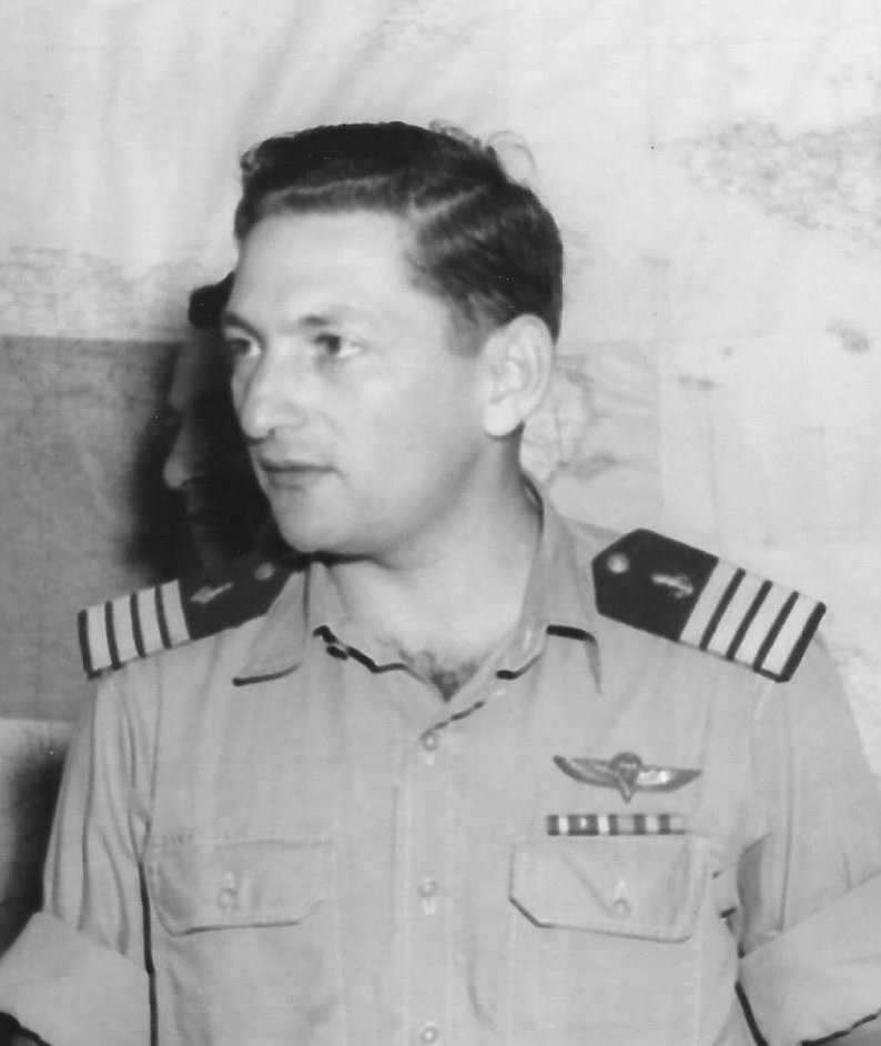 אל"מ שמואל ינאי כראש מחלקת ים 1959.